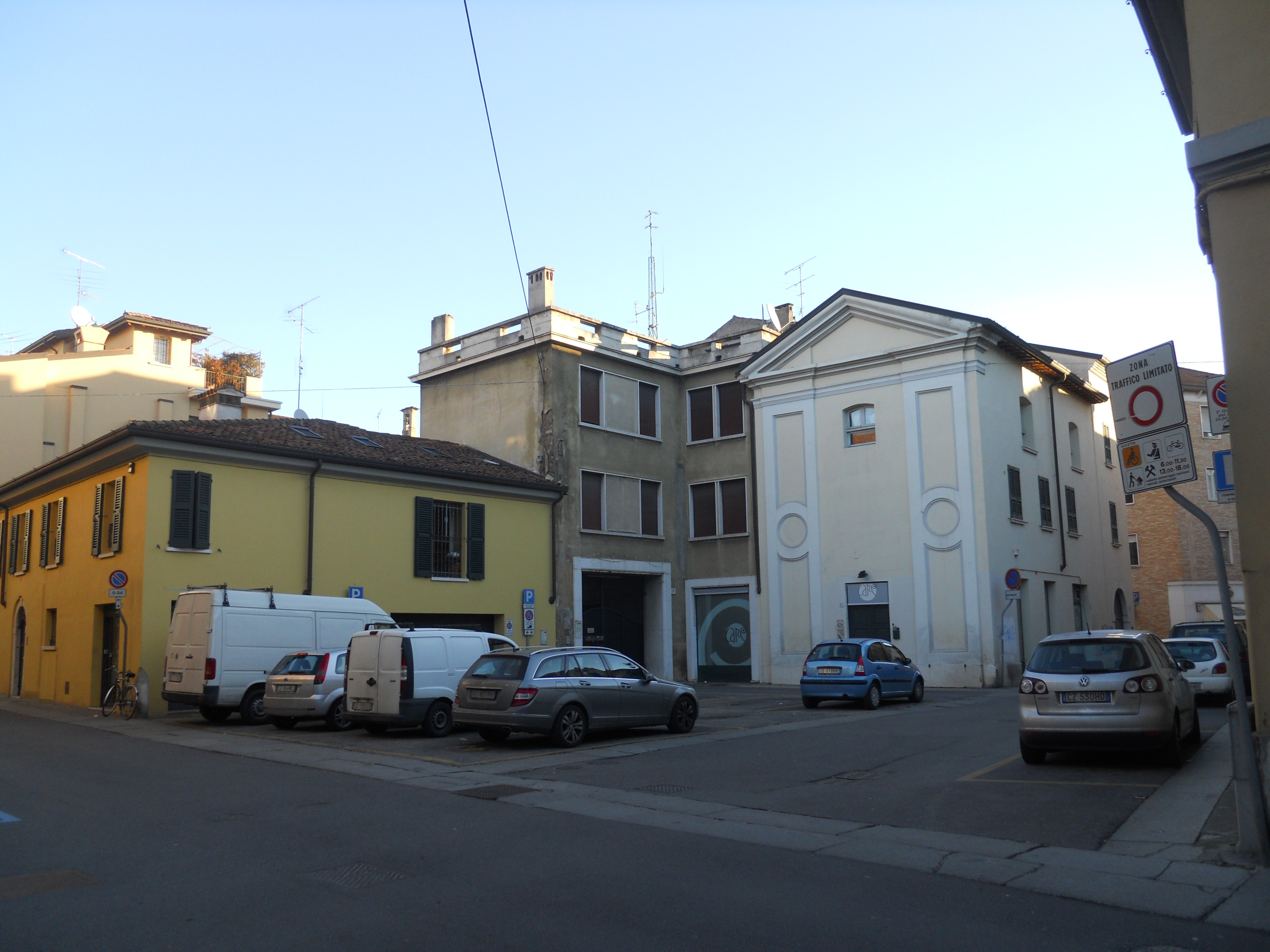 facciata della chiesa di santa maria della mansione (Brescia)